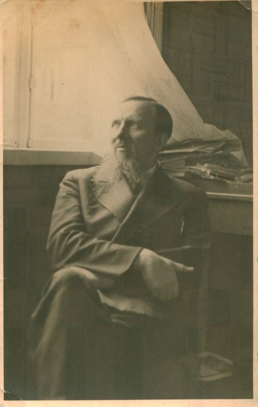 Liudas Gira in 1933